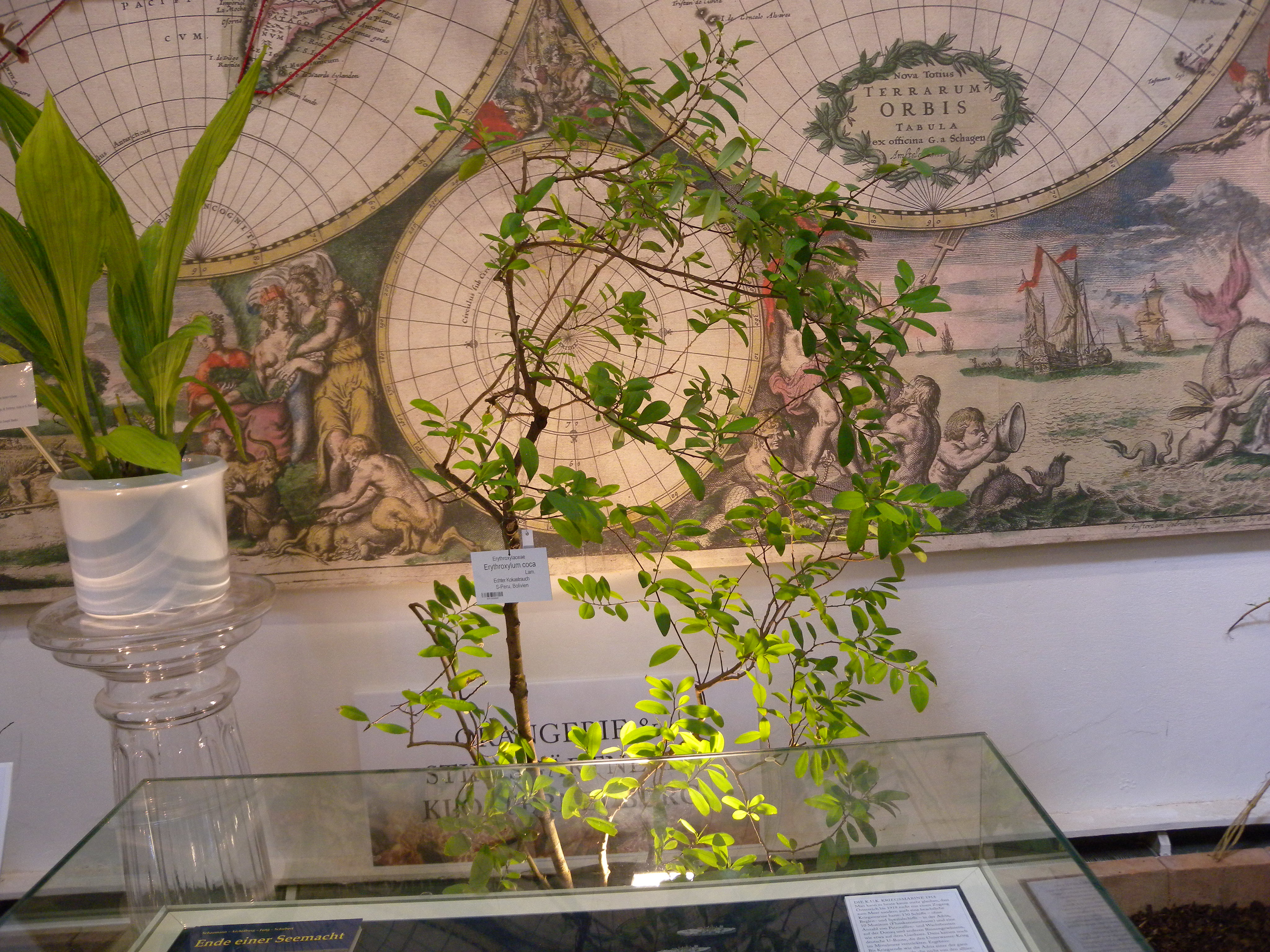 Internationale Orchideen-Ausstellung 2013 in Stift Klosterneuburg: Coca-Strauch